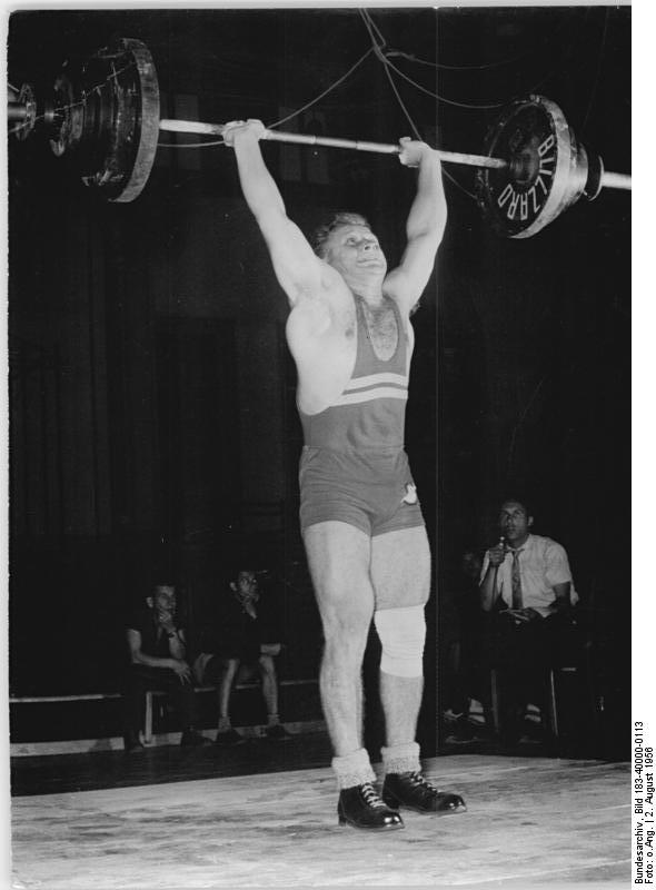 Dieter Göhring Zentralbild Kollektiv Fu-Krz. 2.8.1956 In Leipzig begannen die Sportveranstalgunen In der Turnhalle C der DHfK begannen am Donnerstag, dem 2.8.1956, die Wettkämpfe der Gewichtheber. UBz: Einen neuen DDR-Rekord im Junioren Leicht-Schwergewicht stellte Dieter Göhring (ZSK Vorwärts Berlin) mit 147 kg auf.